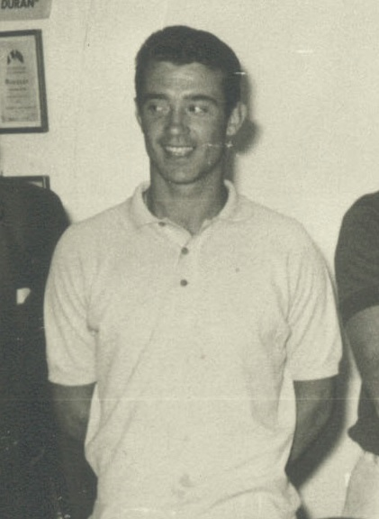 Sánchez García Figueras en Salón Don Guido de las Bodegas de Williams & Humbert Ltd., de Jerez de la Frontera